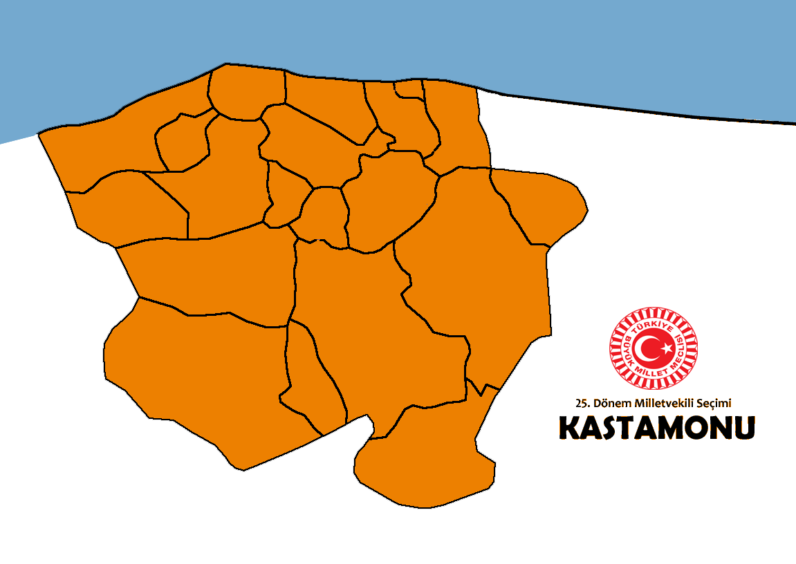 2015 genel seçim sonuçları